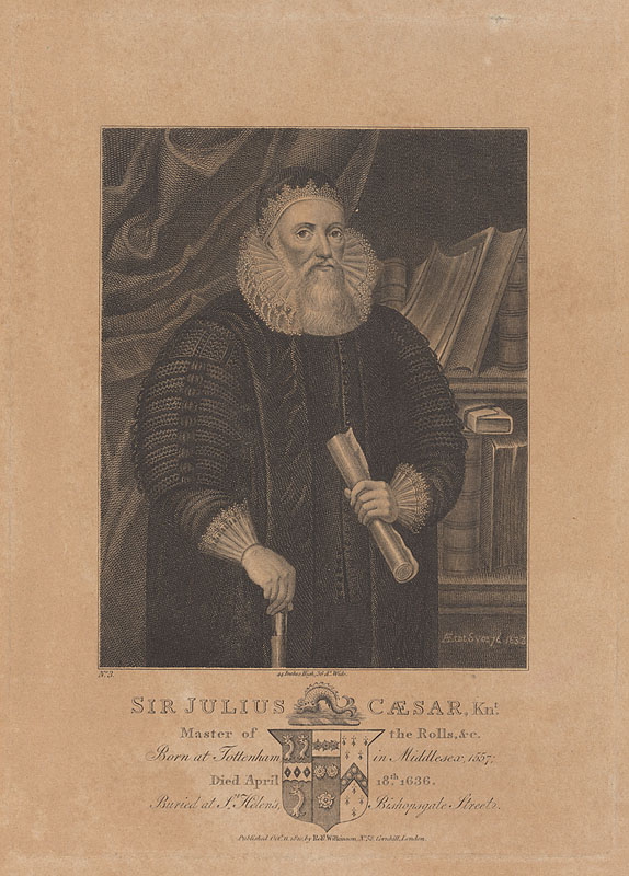 Sir Julius Caesar (1557/58-1636)